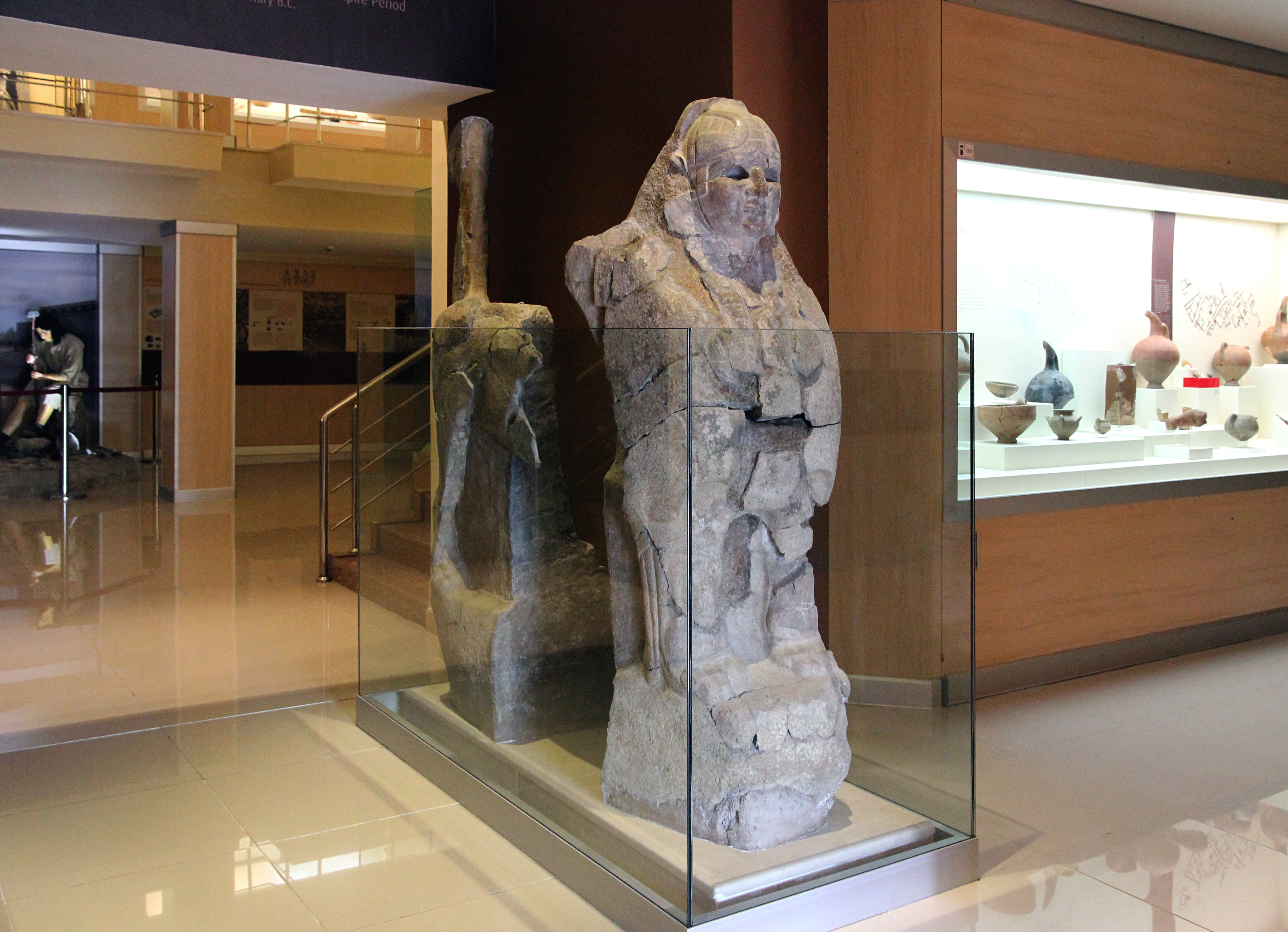 Ḫattuša, Hauptstadt der Hethiter, Museum Boğazkale, Zentraltürkei, restaurierte westliche Sphinx von der Nordseite des Sphinxtores